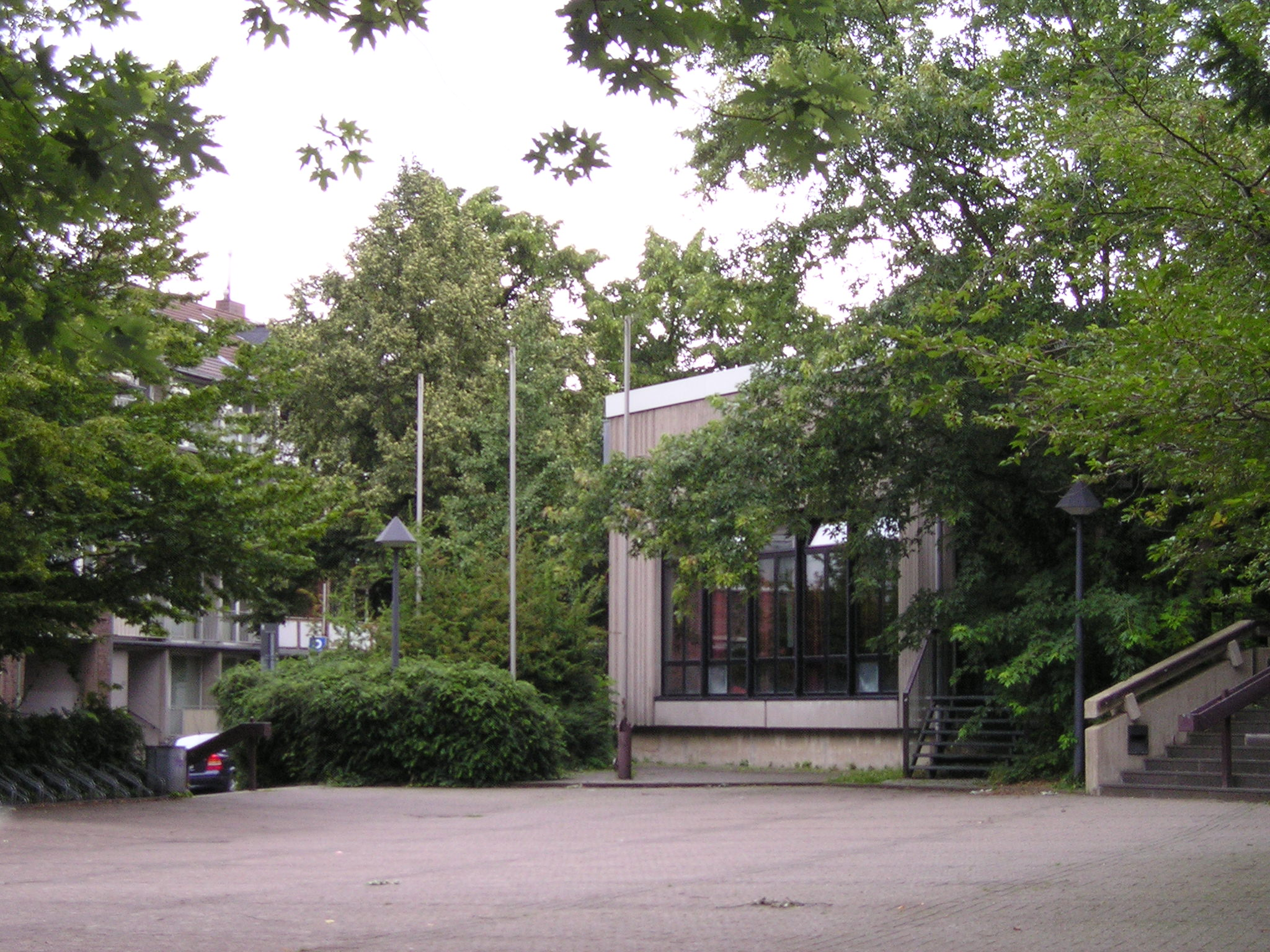 Quirinus Gymnasium, Neuss; Sternstraße 49